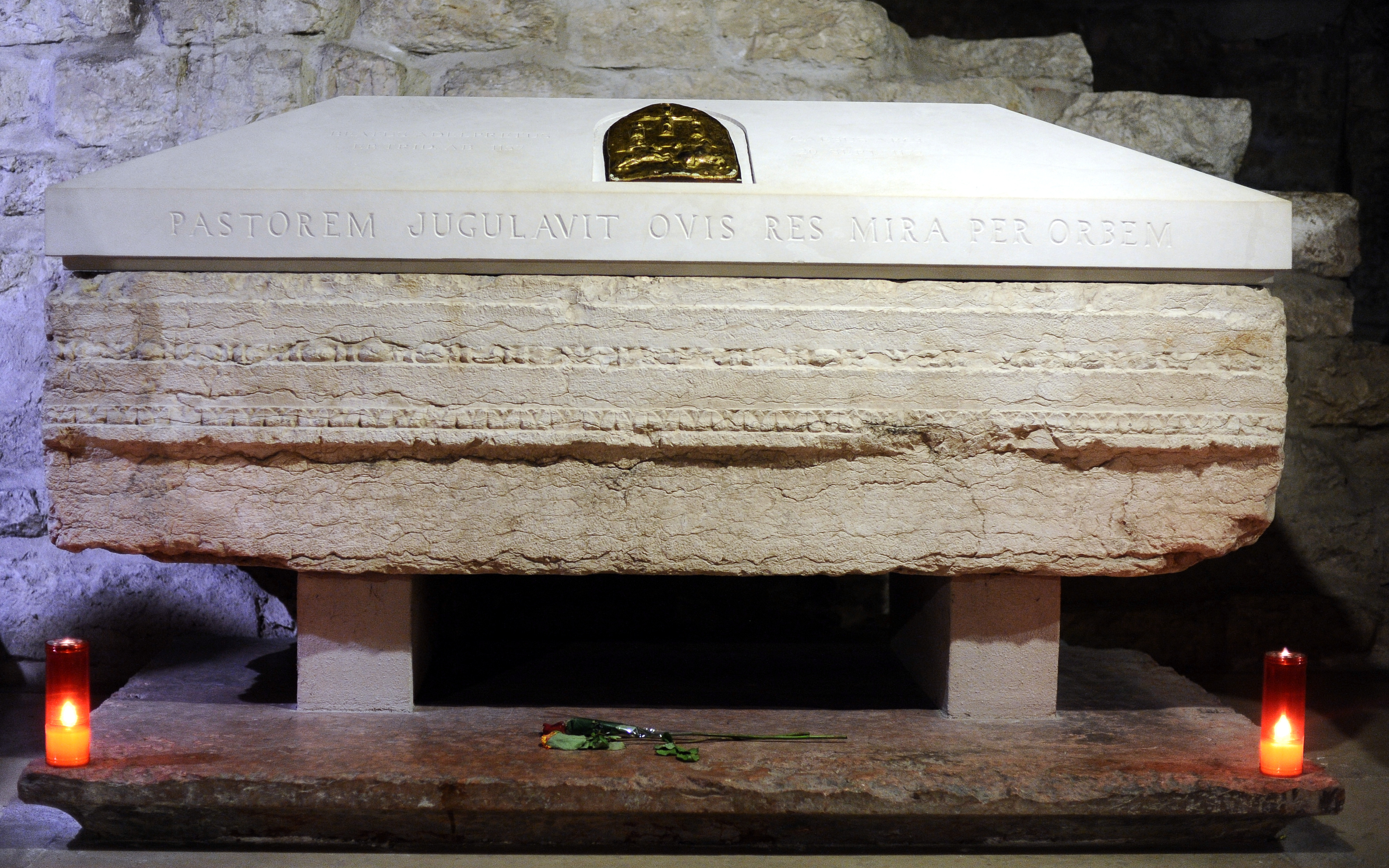 Basilica Paleocristiana di San Vigilio. Sarcofago che dal 1977 contiene i resti di Adelpreto. This is a photo of a monument which is part of cultural heritage of Italy.